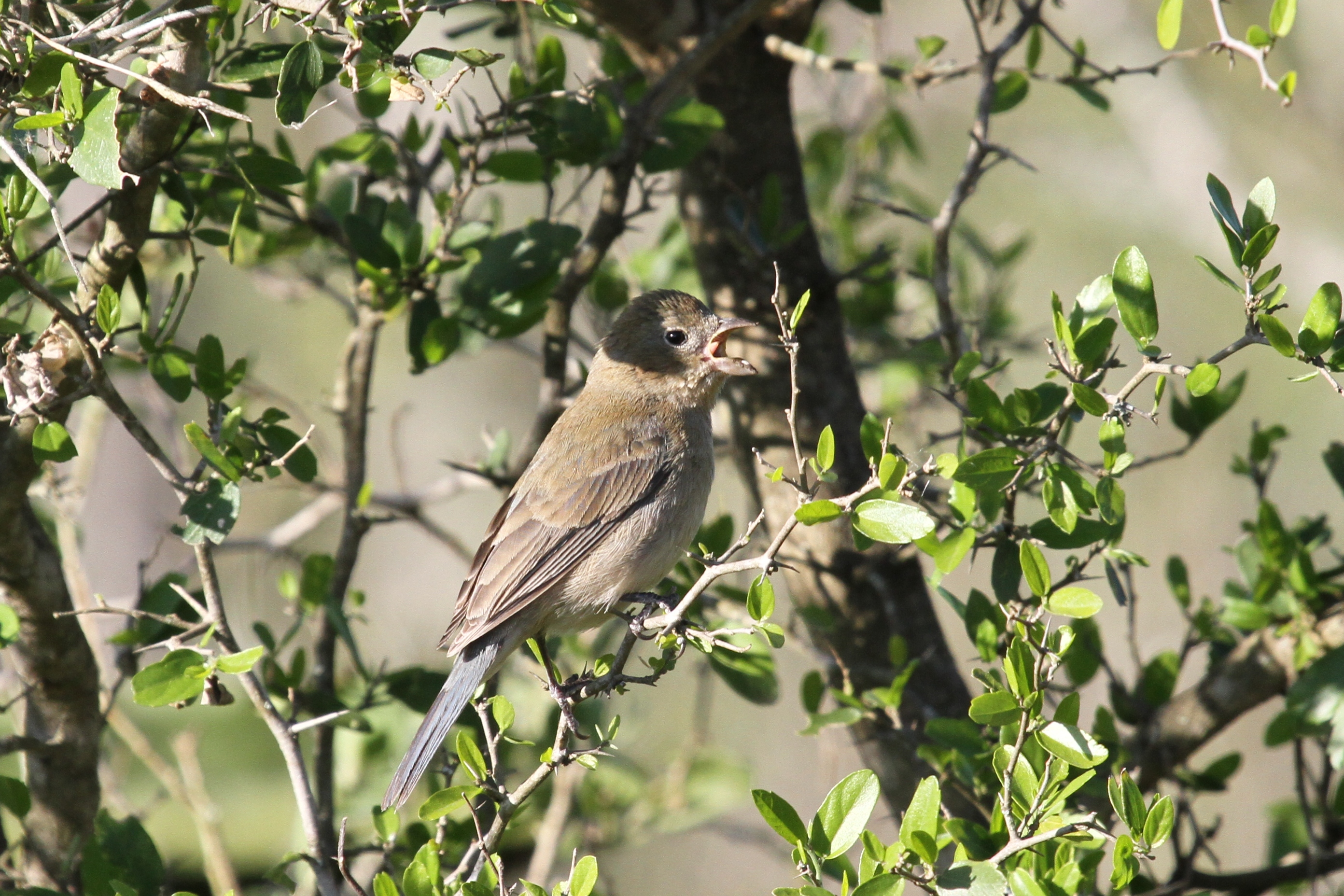 Colorín Morado -Passerina versicolor- Varied Bunting (hembra)